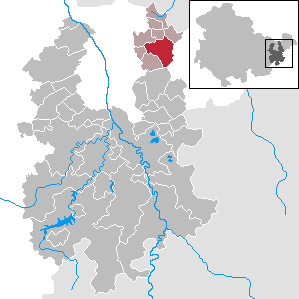 Großenstein in Thuringia - District Greiz